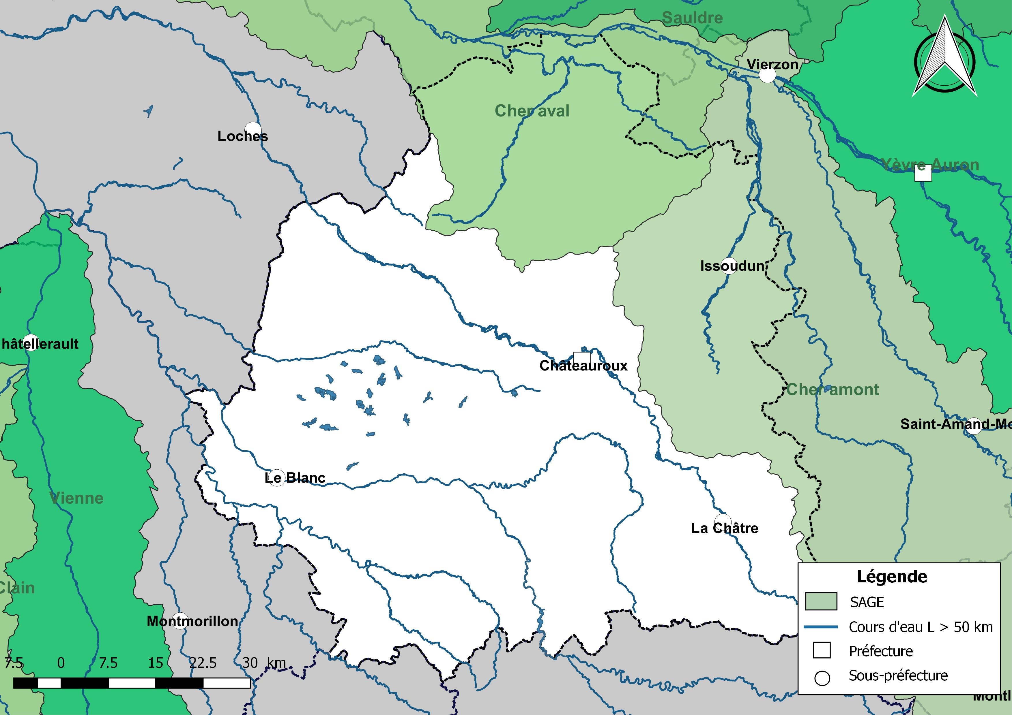 Carte des schémas d'aménagement et de gestion des eaux (SAGE) concernant le département de l'Indre (France) au 1er janvier 2018.